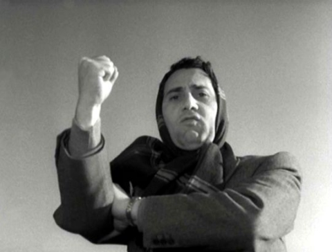 Screenshot del film I vitelloni (1953)